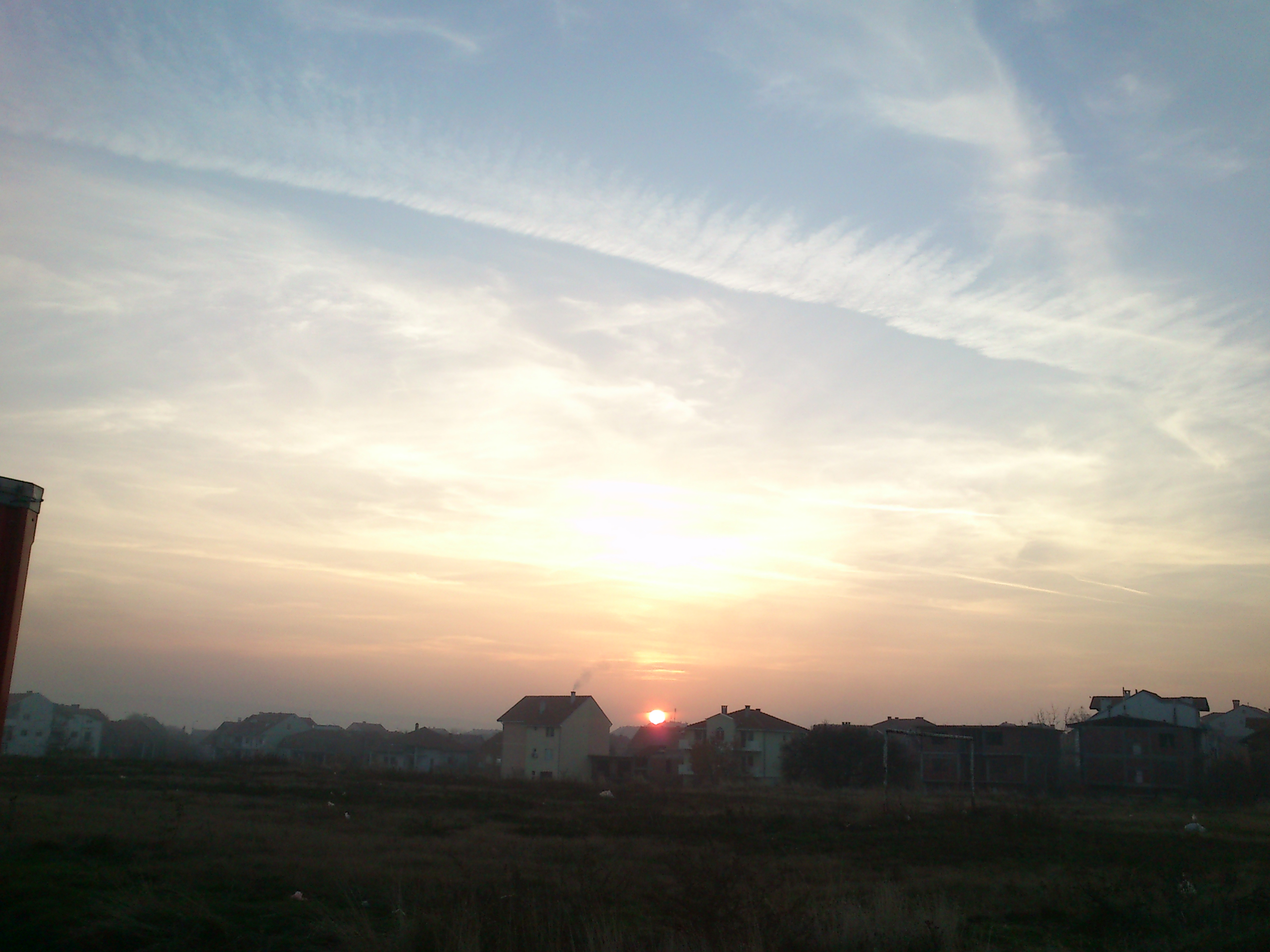 Zalazak sunca Donja vrezina Licensing